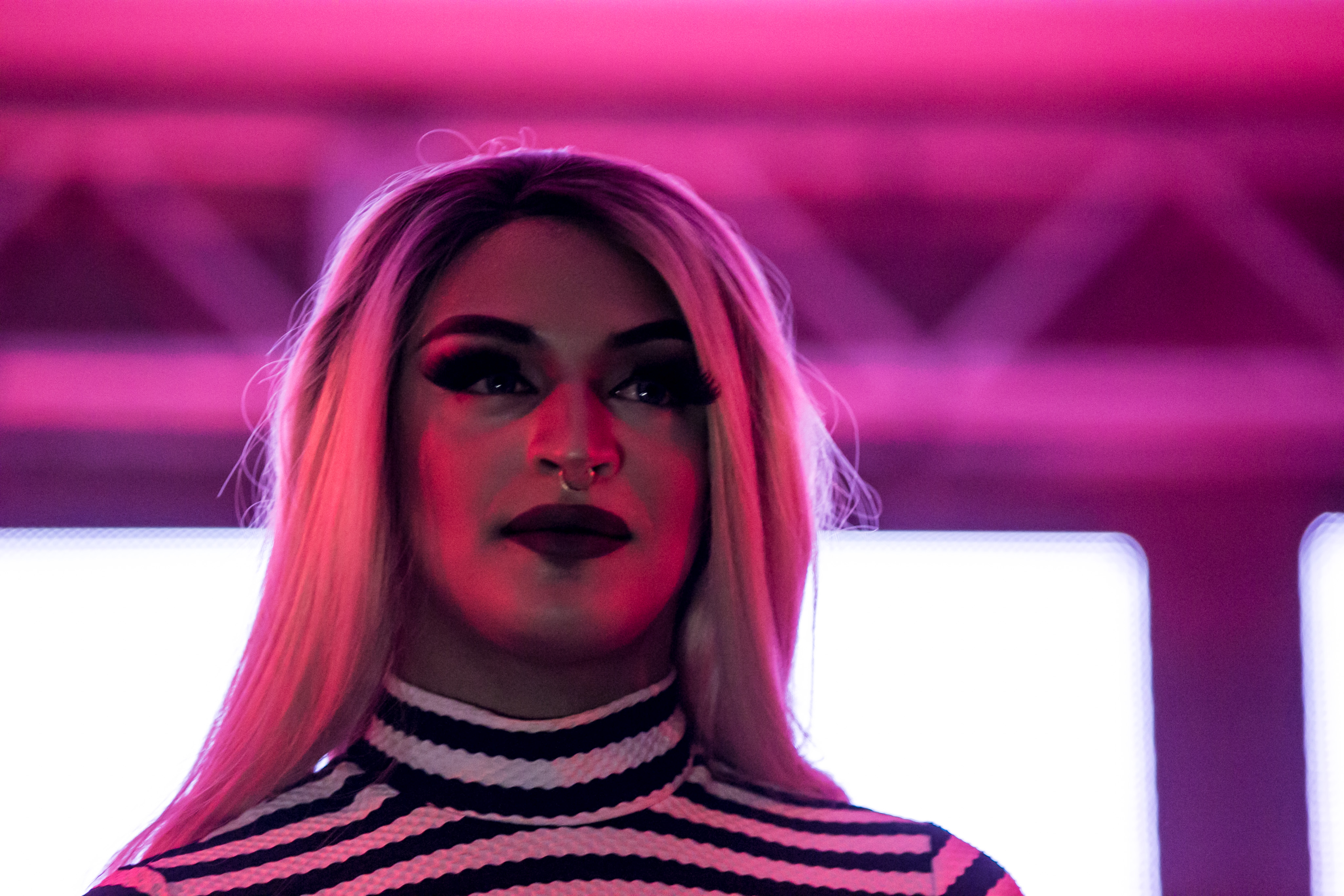 Pabllo Vittar em Brasília em 2016